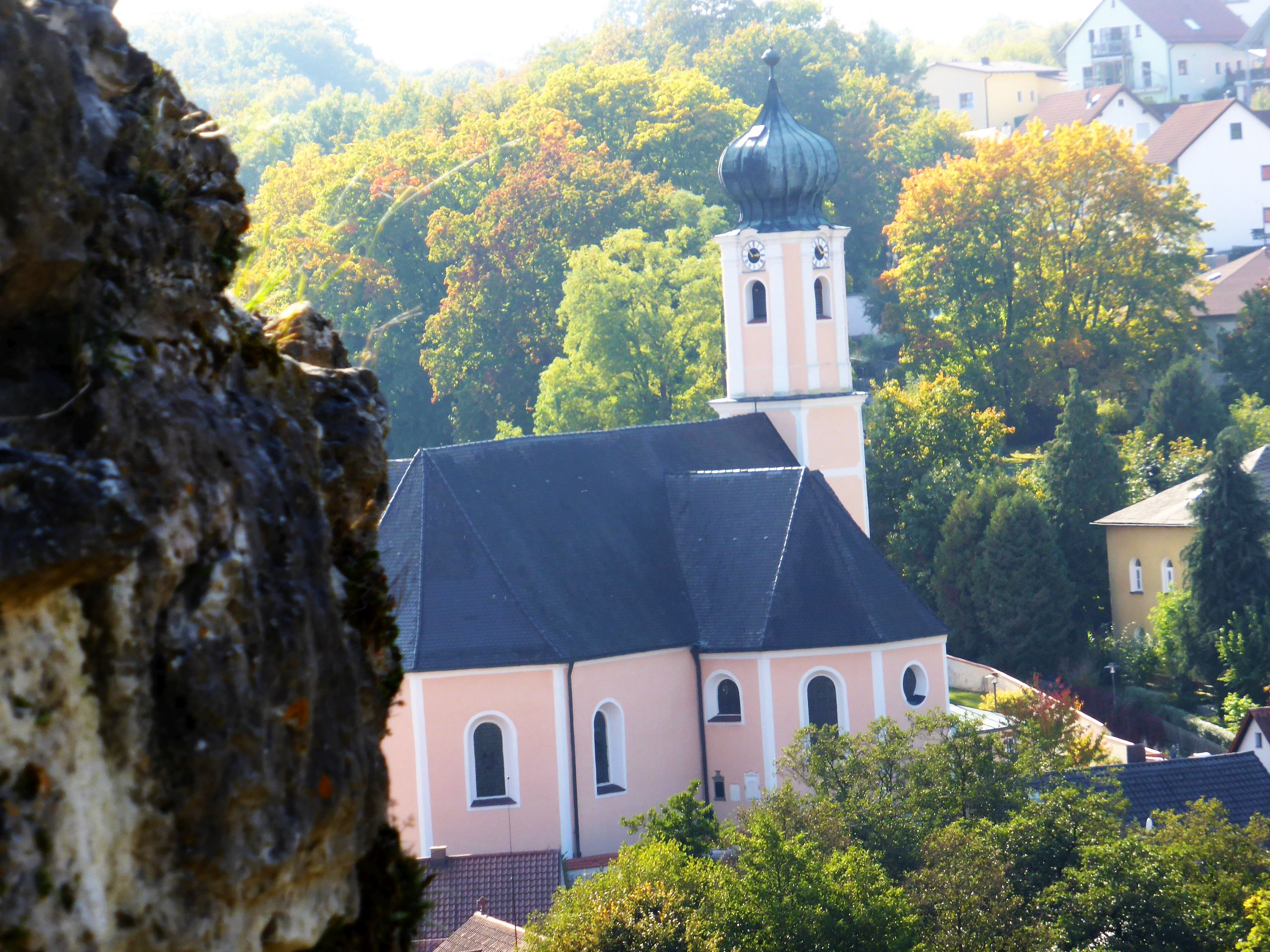 Laaber (Pfarrkirche St. Jakobus-1)